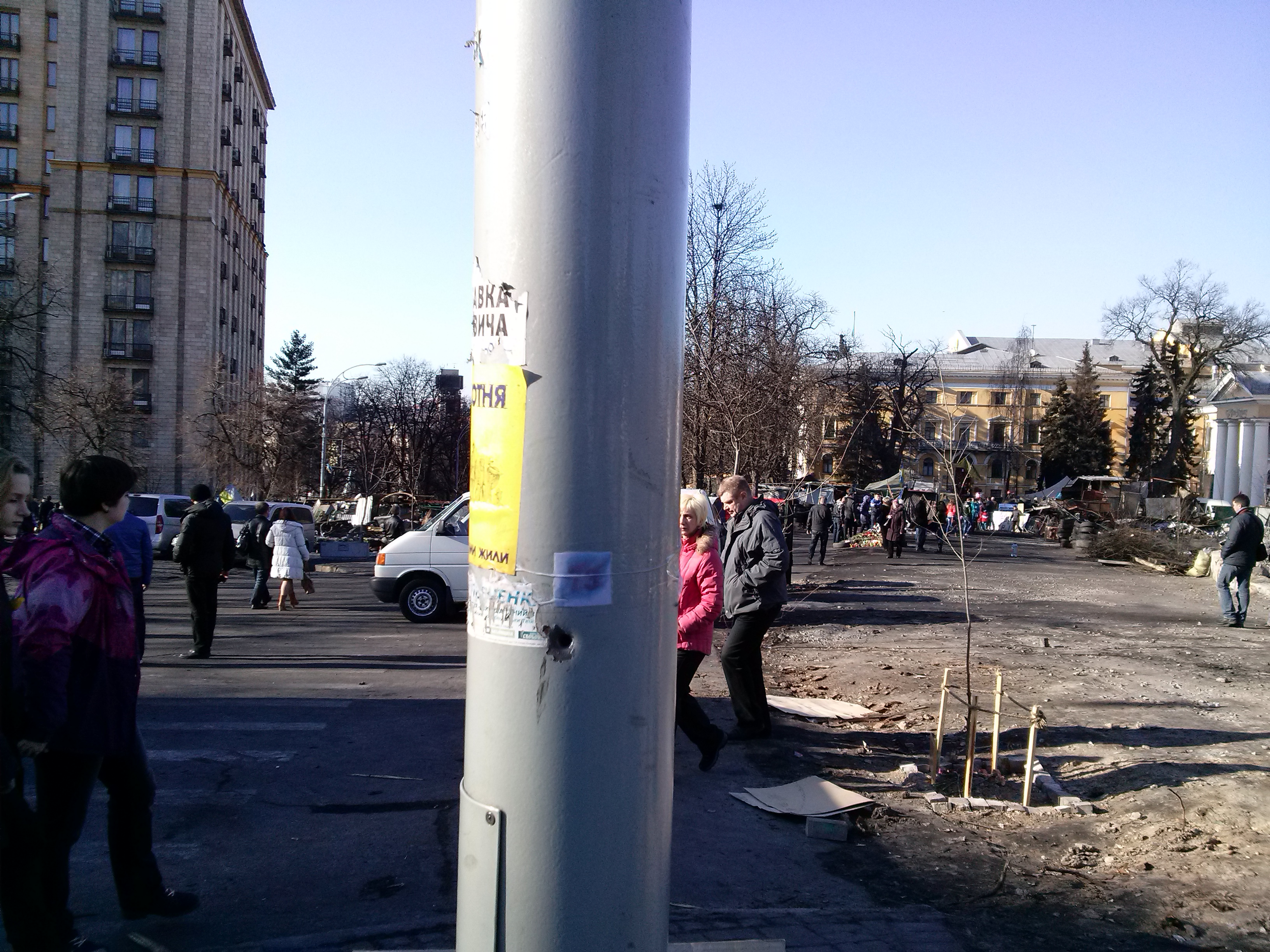 Сліди від куль в металевій електроопорі на Інститутській